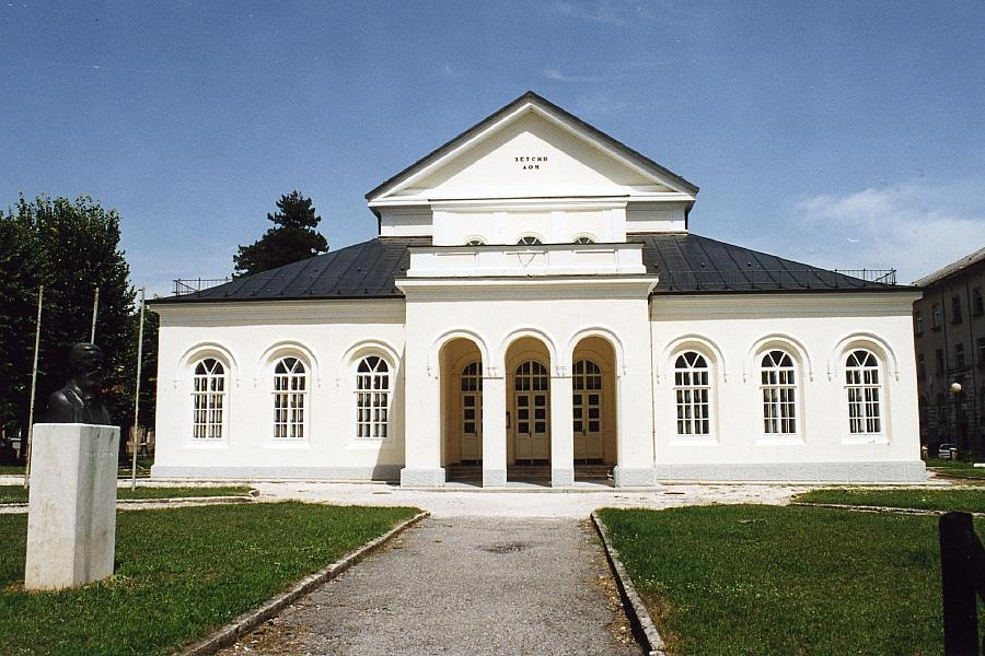 "Zetski Dom" Theatre in Cetinje, Montenegro